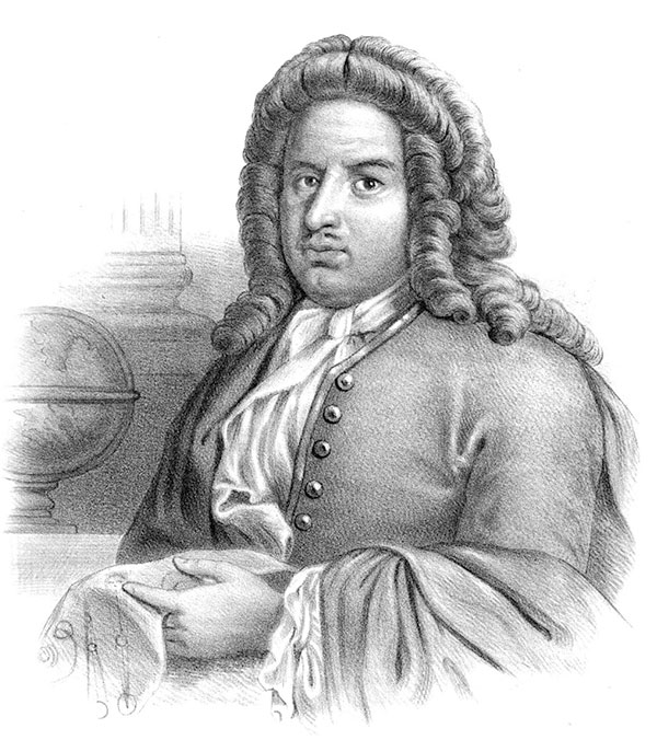 Anders Spole (1630-1699)